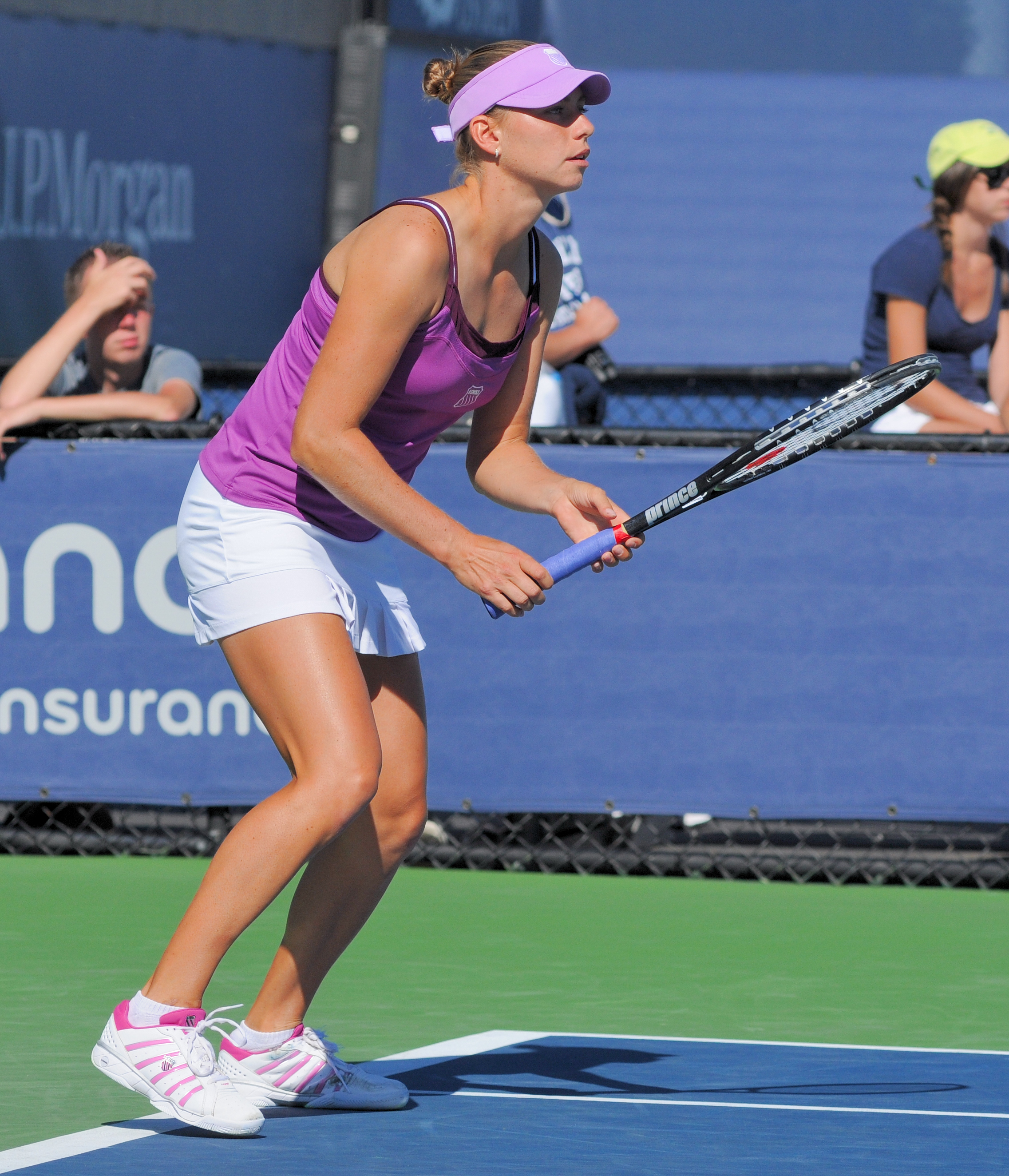 Vera Zvonareva - US Open 2010